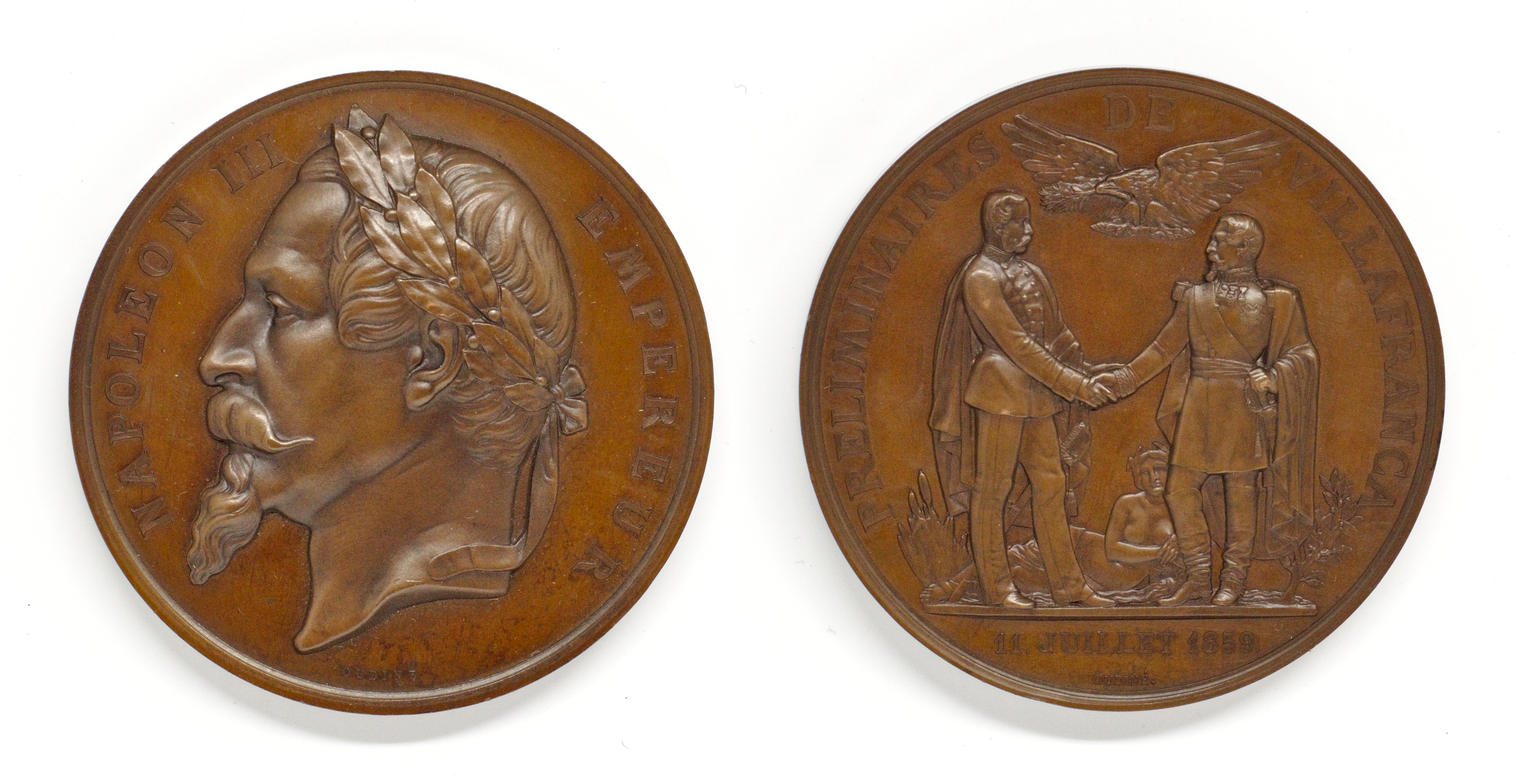 Médaille de Napoléon III - Préliminaires de Villafranca - Oudiné 1859